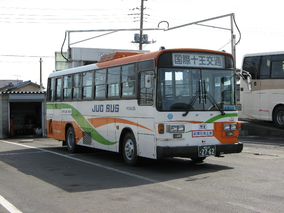 国際十王交通9406号車。十王自動車時代からの塗色車両。国際十王交通伊勢崎営業所敷地外（公道上）より撮影。